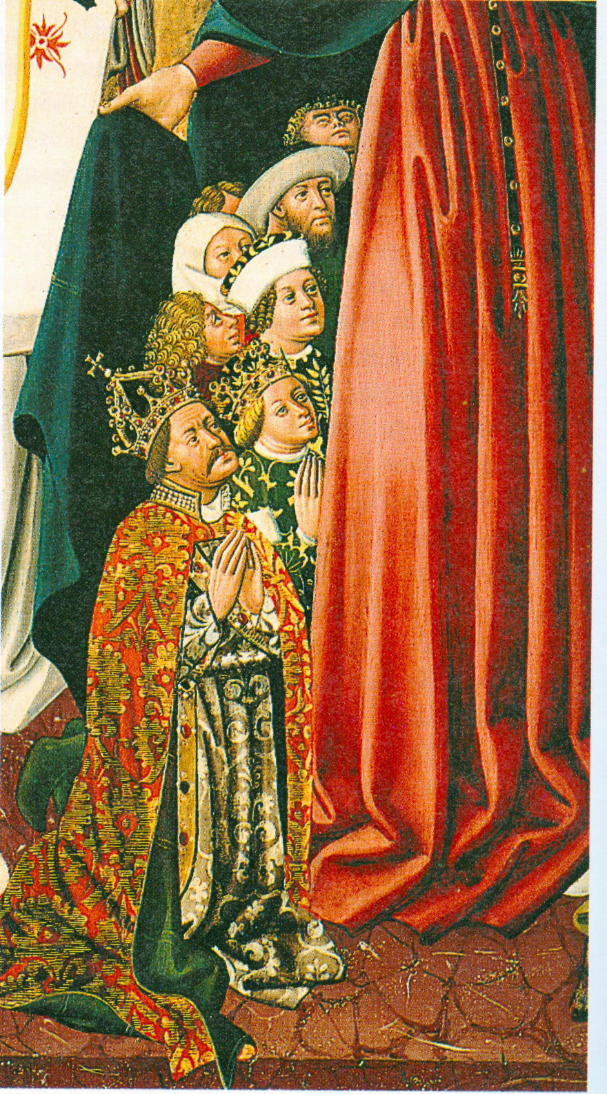 König Albrecht II. und seine Frau Elisabeth Ausschnitt aus dem Albrechtsaltar im Stift Klosterneuburg